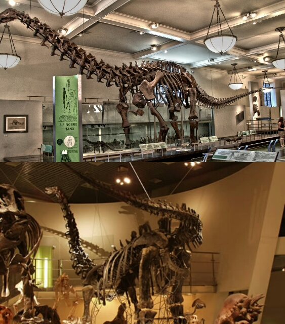 ブロントサウルス（上）とアパトサウルス（下）